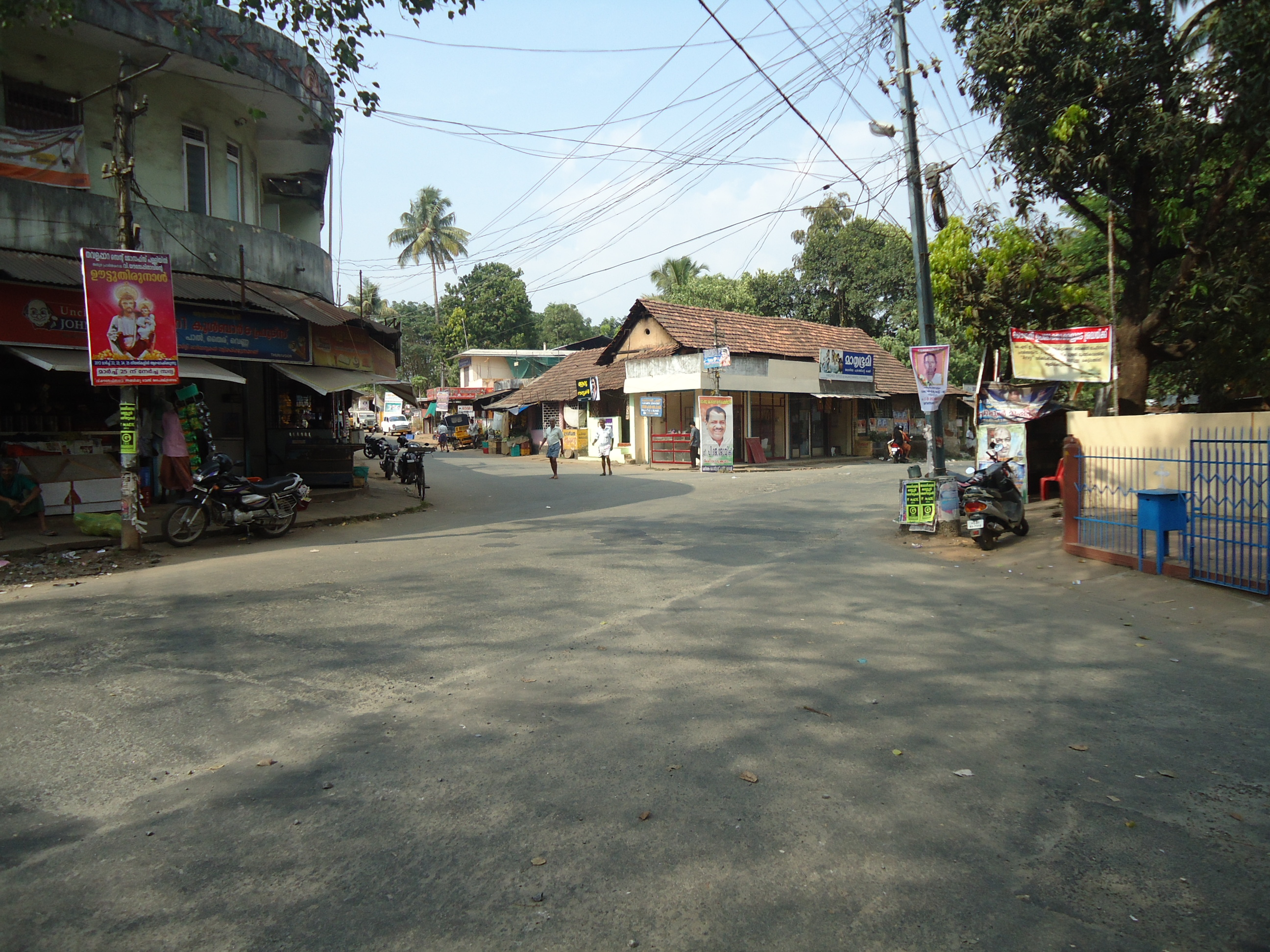 Thuravoor, Angamaly Main Junction. Angamaly-Manjapra Road and Kalady-Mookkannoor Road Crossing